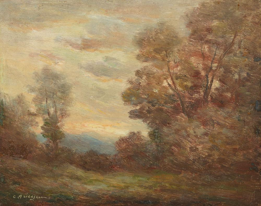 Constantin Aricescu - Efect de lumină în amurg, ulei pe carton, 19 x 24 cm, semnat stânga jos, cu alb, C. Aricescu.